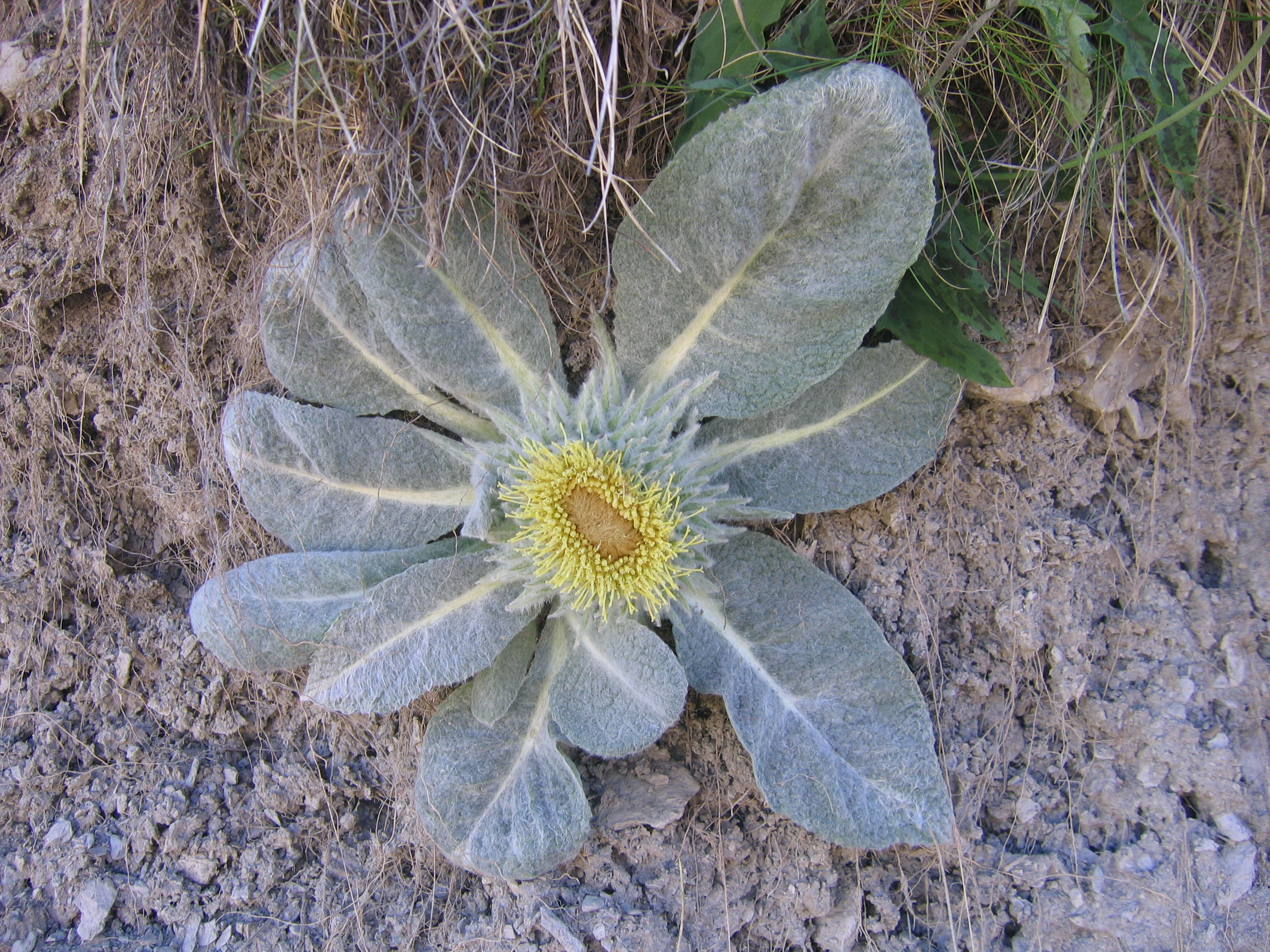 Bérardie laineuse (Berardia subacaulis Vill.) en gros plan, photographiée lors d'une randonnée vers la Mortice avant le lac des 9 couleurs (au dessus de Vars) dans les Hautes-Alpes.